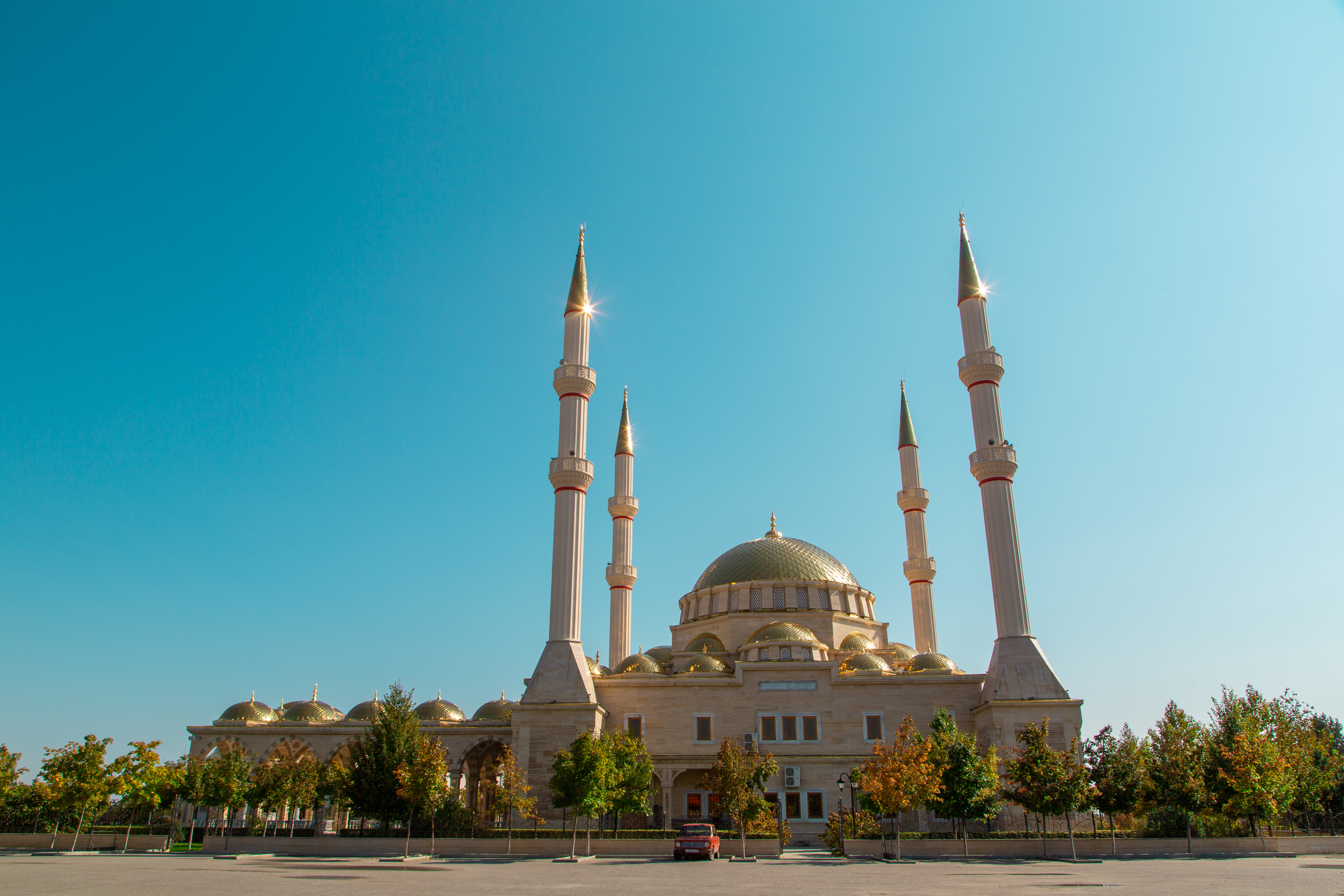 Мечеть в с. Ачхой-Мартан